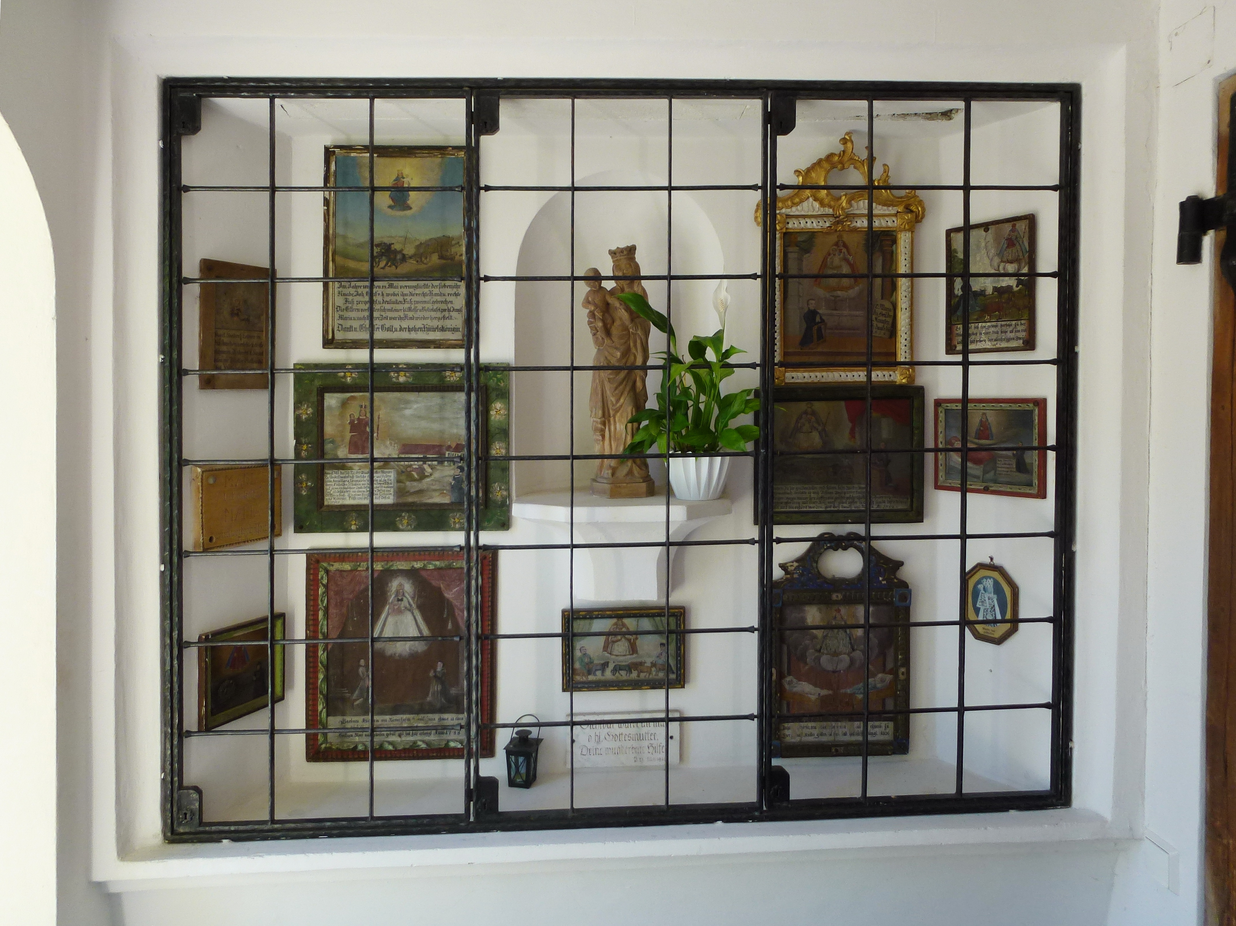 Unterschweinbach, Katholische Filialkirche St. Mariä Himmelfahrt: Detail Votivtafeln im Eingangsbereich